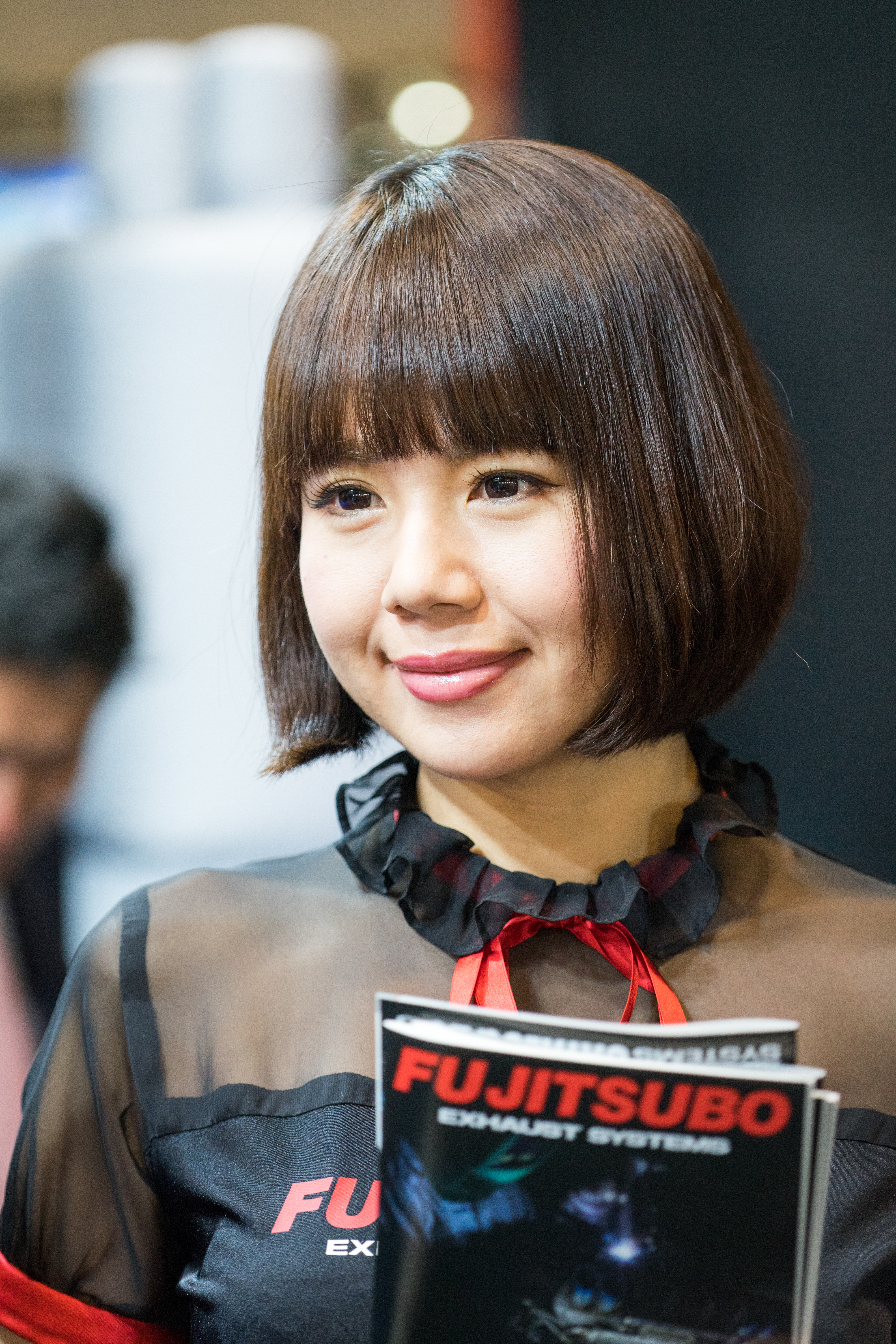 TOKYO AUTO SALON 2017 （東京オートサロン2017）-124.jpg